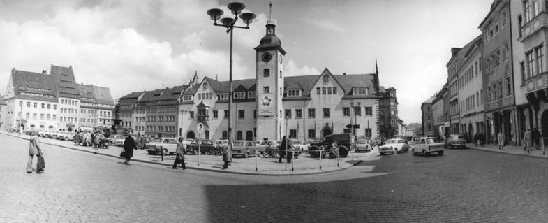 Freiberg, Marktplatz, Rathaus ADN-ZB Thieme 16.5.1973 Bez. Karl-Marx-Stadt: Freiberg Teilansicht des Obermarktes der Bergstadt Freiberg mit dem 1775 erbauten Rathaus.